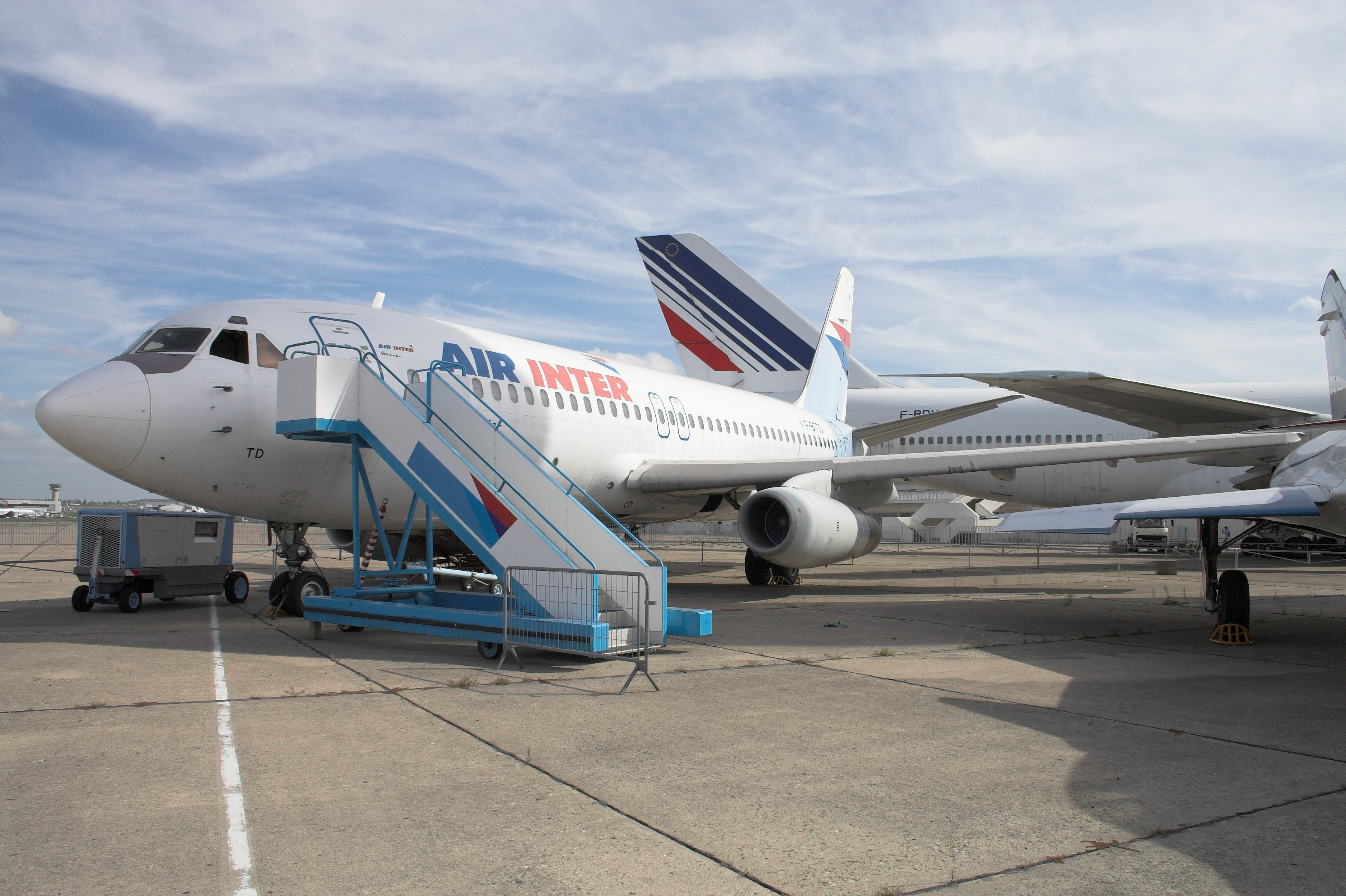 Dassault Mercure in the Museum of Air and Space (Musée de l'air et de l'espace, Le Bourget, France)